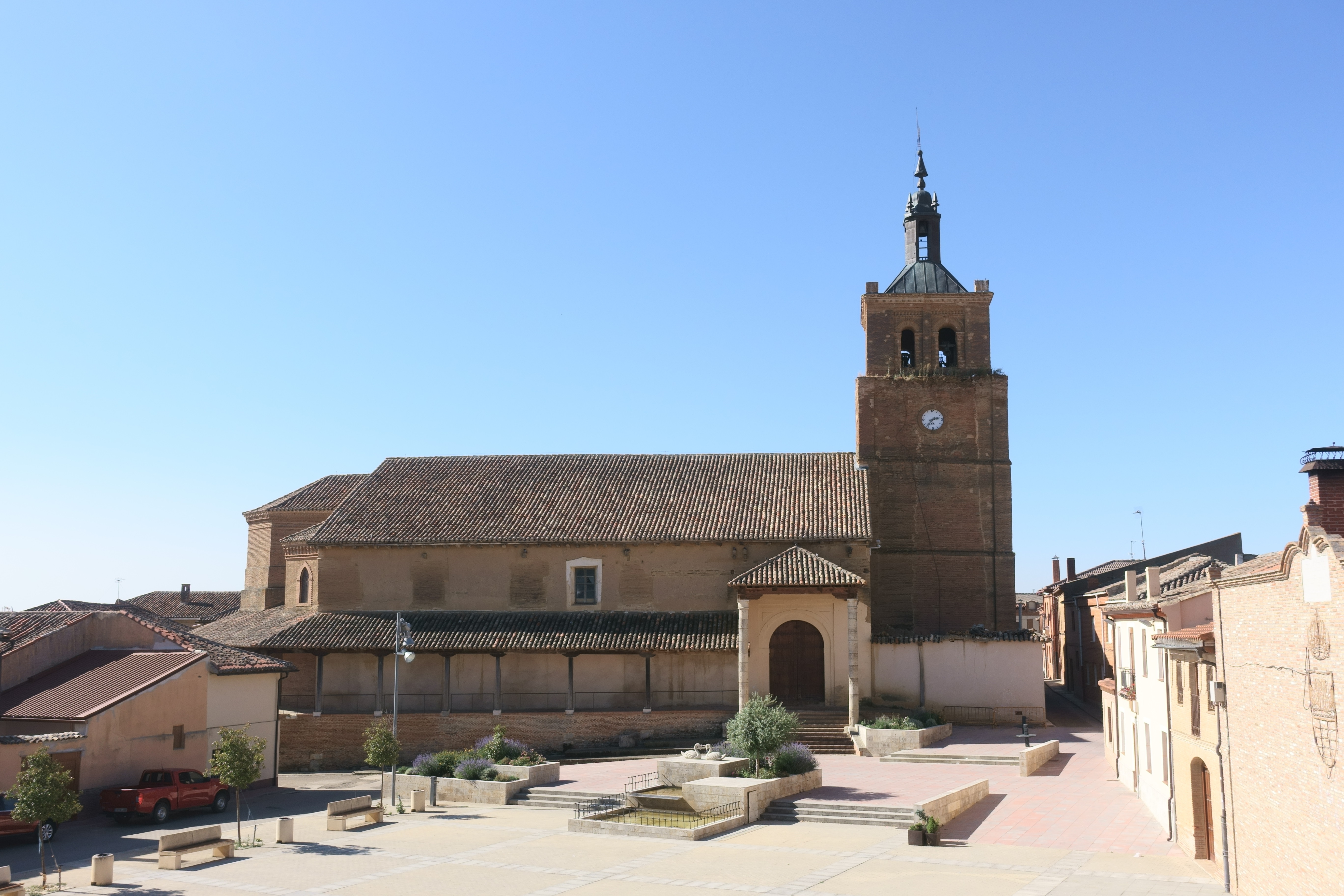 Iglesia de San Facundo y San Primitivo, en Cisneros (Palencia, España).